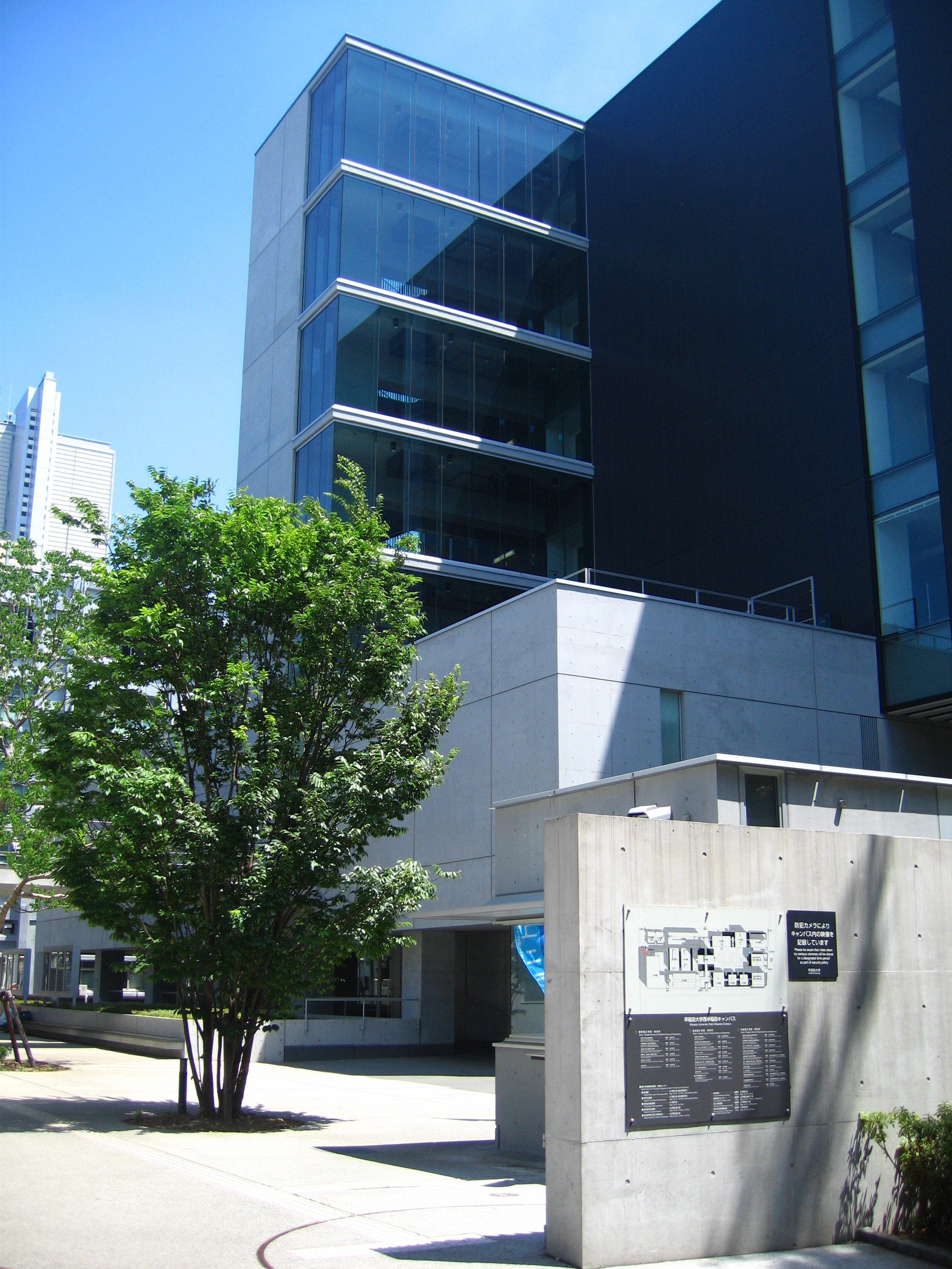 早稲田大学 西早稲田キャンパス 63号館 (Nishi-Waseda Campus)